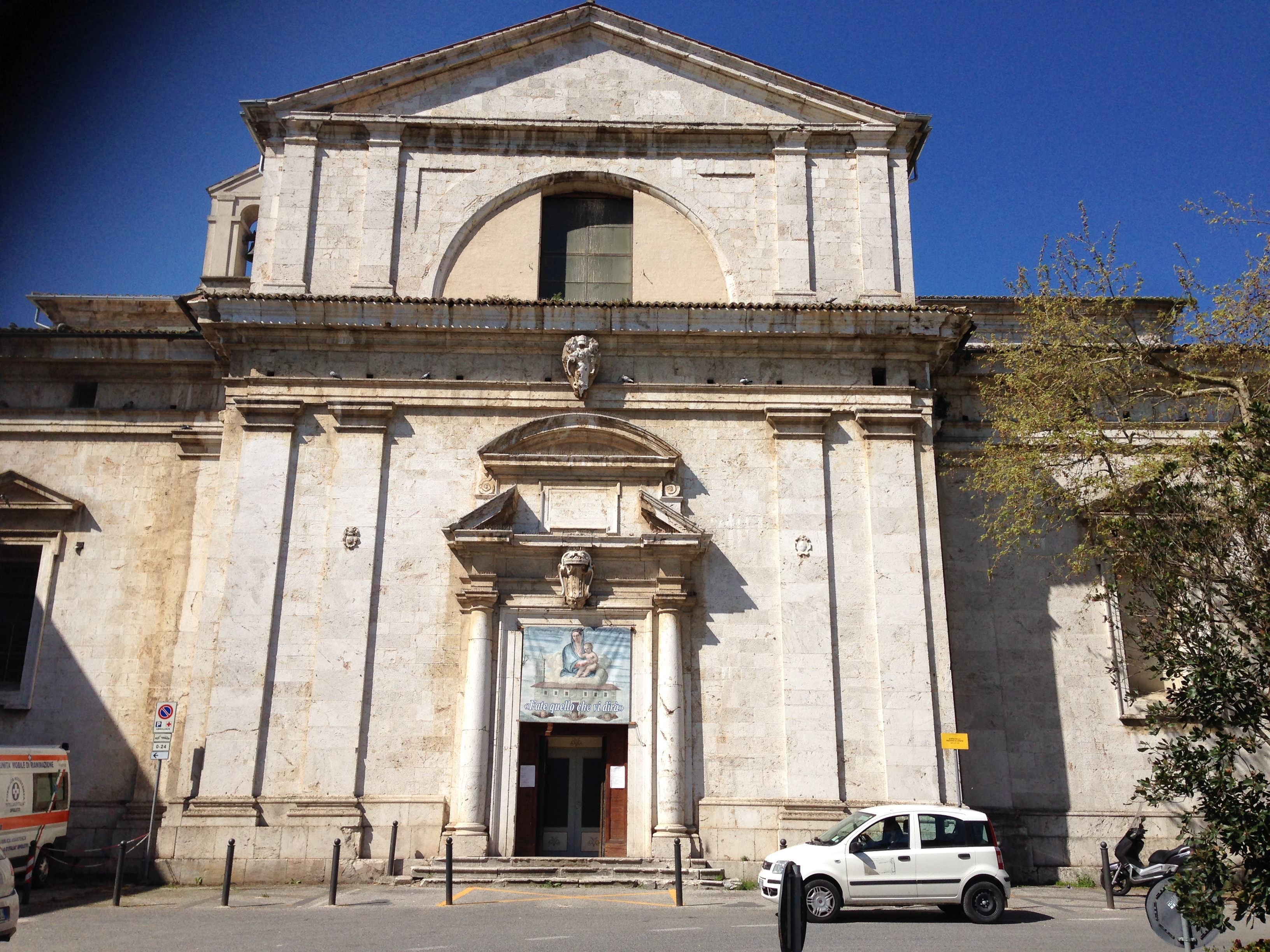 Spoleto. Santuario della Madonna di Loreto